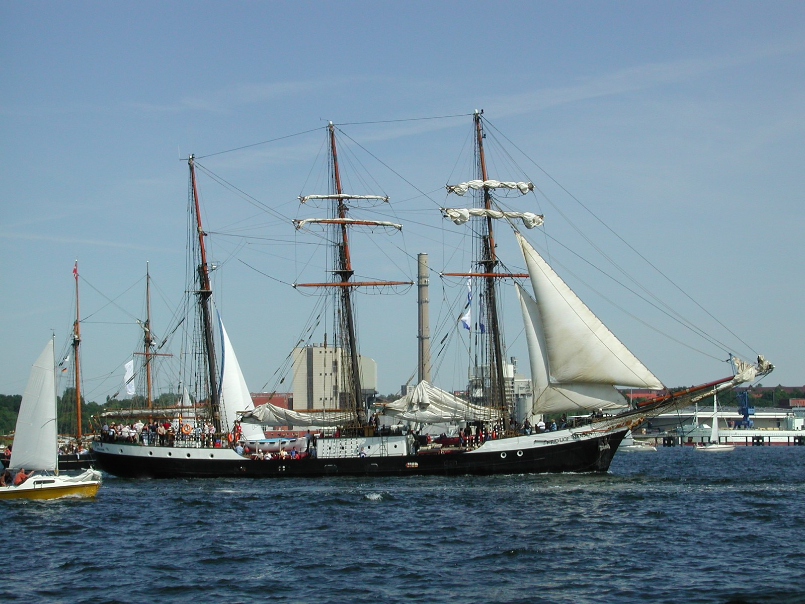 Segelschiff Fridtjof Nansen im Kieler Hafen.